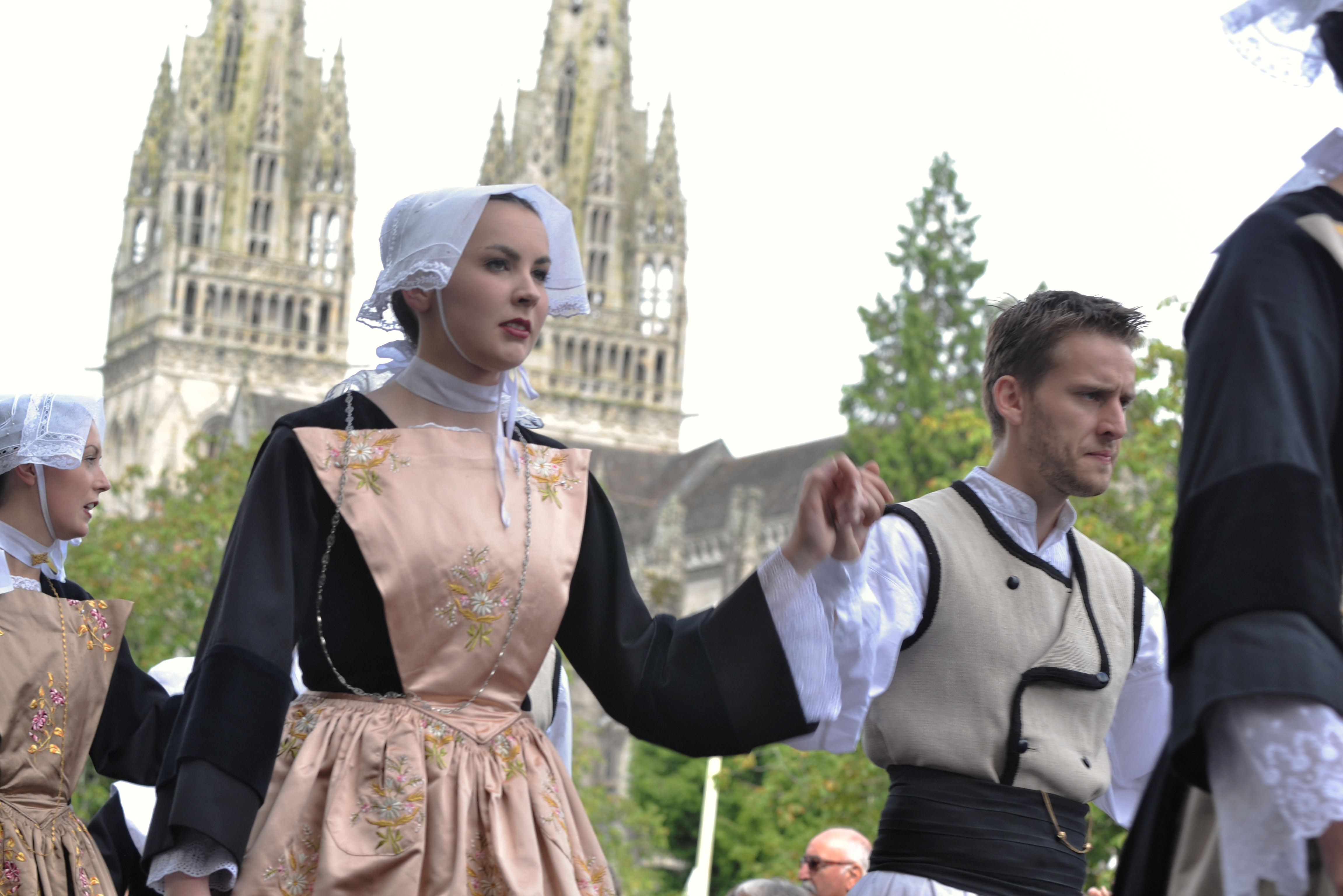 "Défilé en fête". Cercle Kevrenn Alré (Auray) lors du festival de Cornouaille 2013 le dimanche 28 juillet pour Kemper en Fête dans les rues de Quimper.